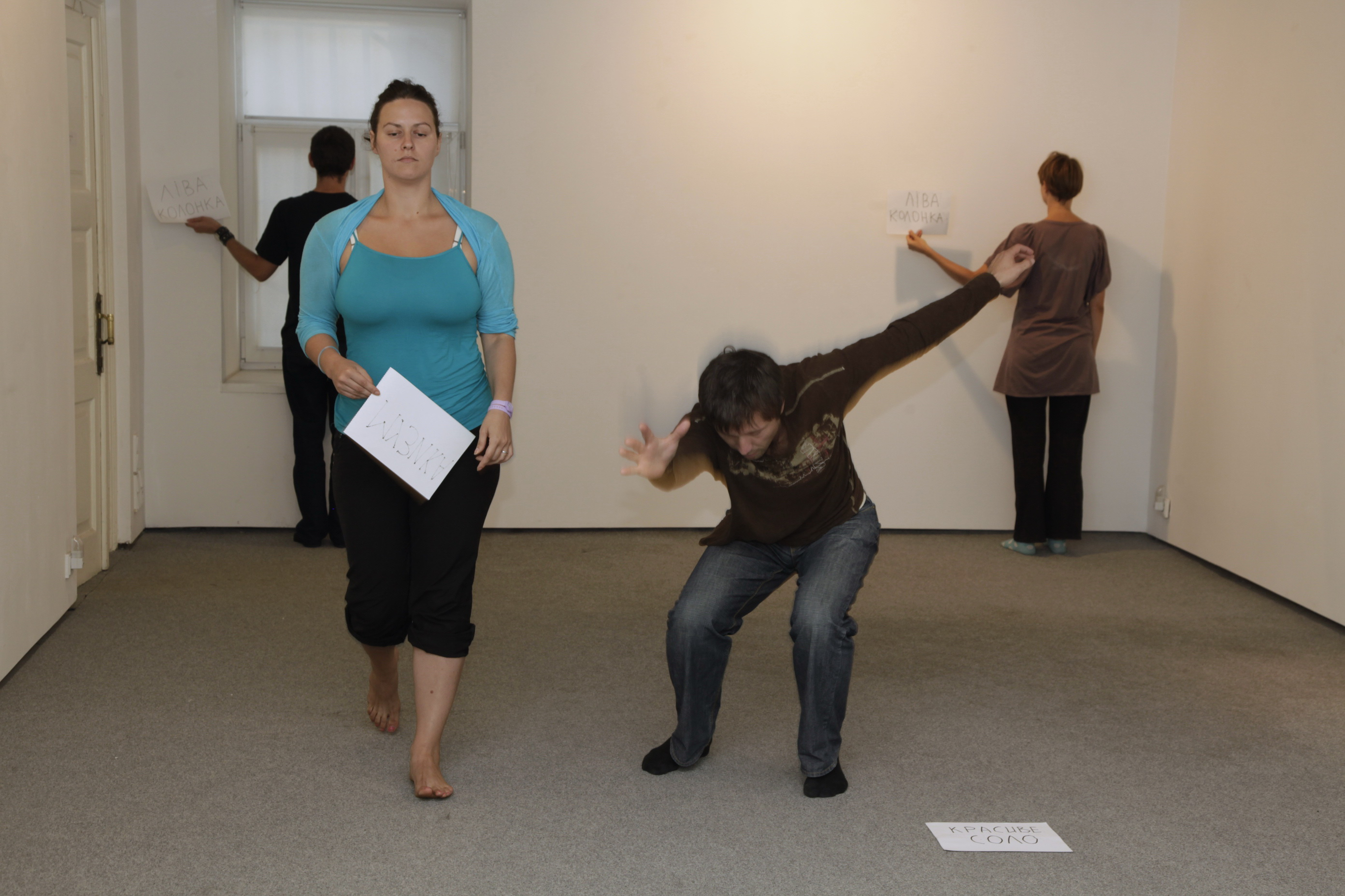 Перформанс "Monstra" Олега Сулименко, 2012